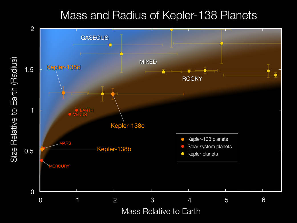 Sistema da estrela Kepler-138 comparado a planetas do nosso Sistema Solar.